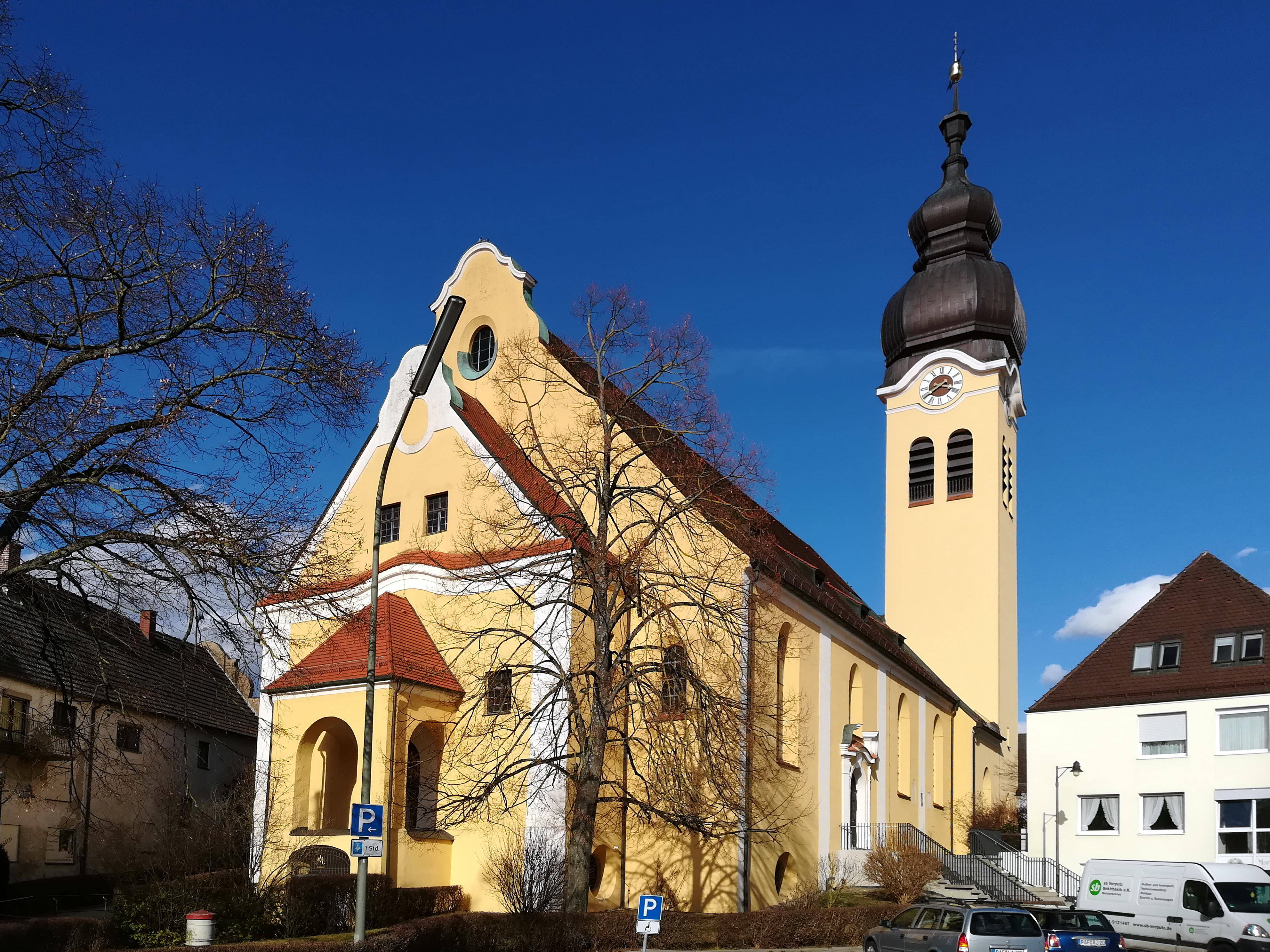 St. Laurentius ist eine katholische Pfarrkirche in Wolnzach.